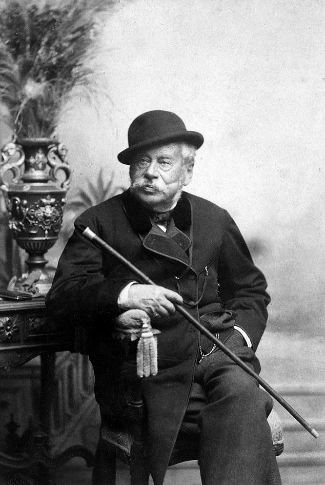 Der Bankier, Stifter und Ehrenbürger der Stadt Fürth, Dr. phil. Wilhelm Königswarter, hier in einer um 1880 gefertigten Fotografie eines noch unidentifizierten Künstlers